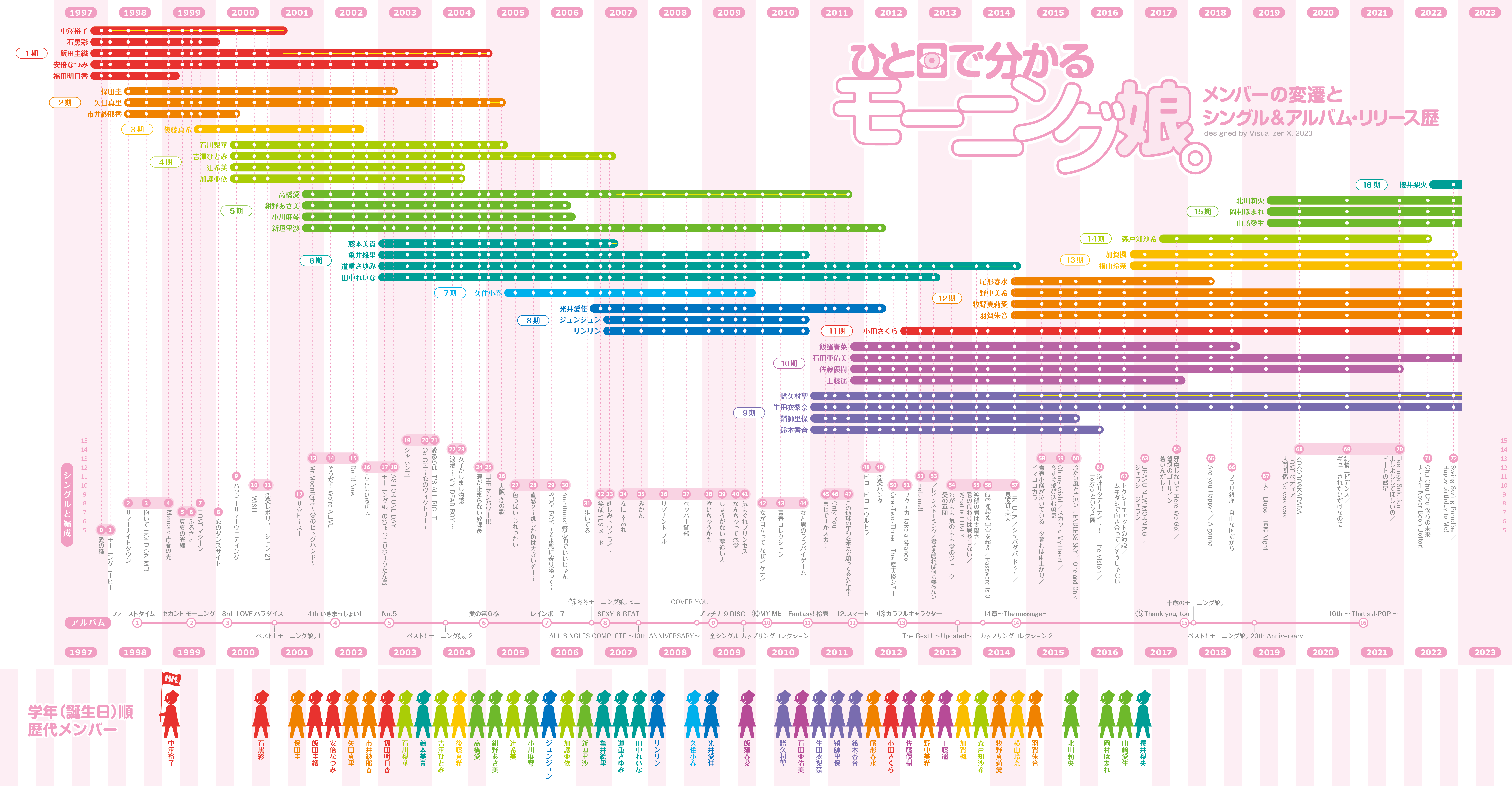 ポップグループがそのメンバーの入れ替え制を取り入れた事により獲得した永続性を表現